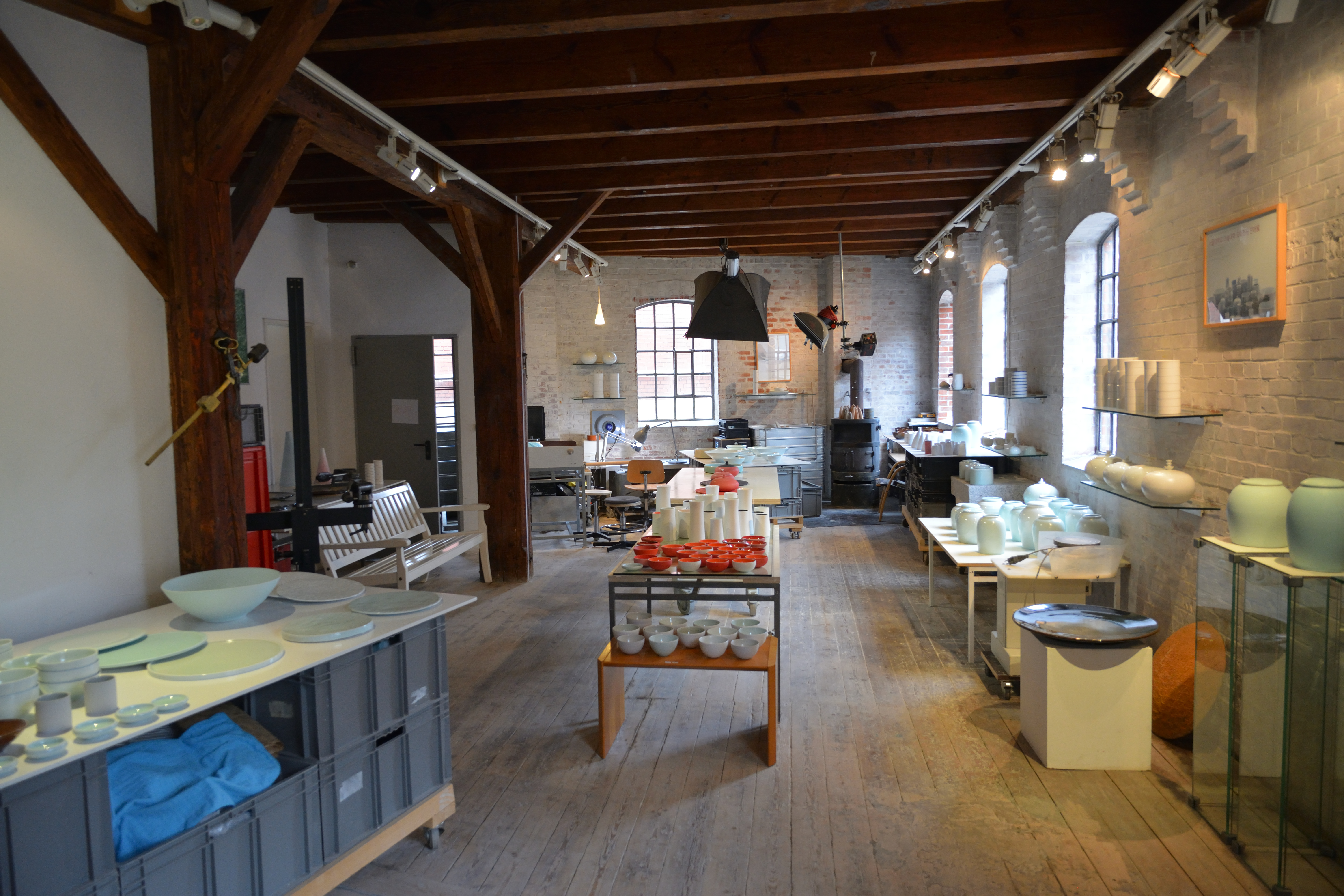 Impressionen vom Töpfermarkt 2018 in Kellinghusen,Hier: Tag der offenen Tür in der Werkstatt von Hwang Kap-Sun.